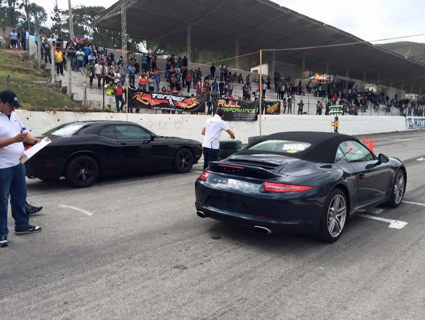 Rafael Sánchez corriendo en el Track Day de Torque Motor Performance Group en la pista de Yahuarcocha.